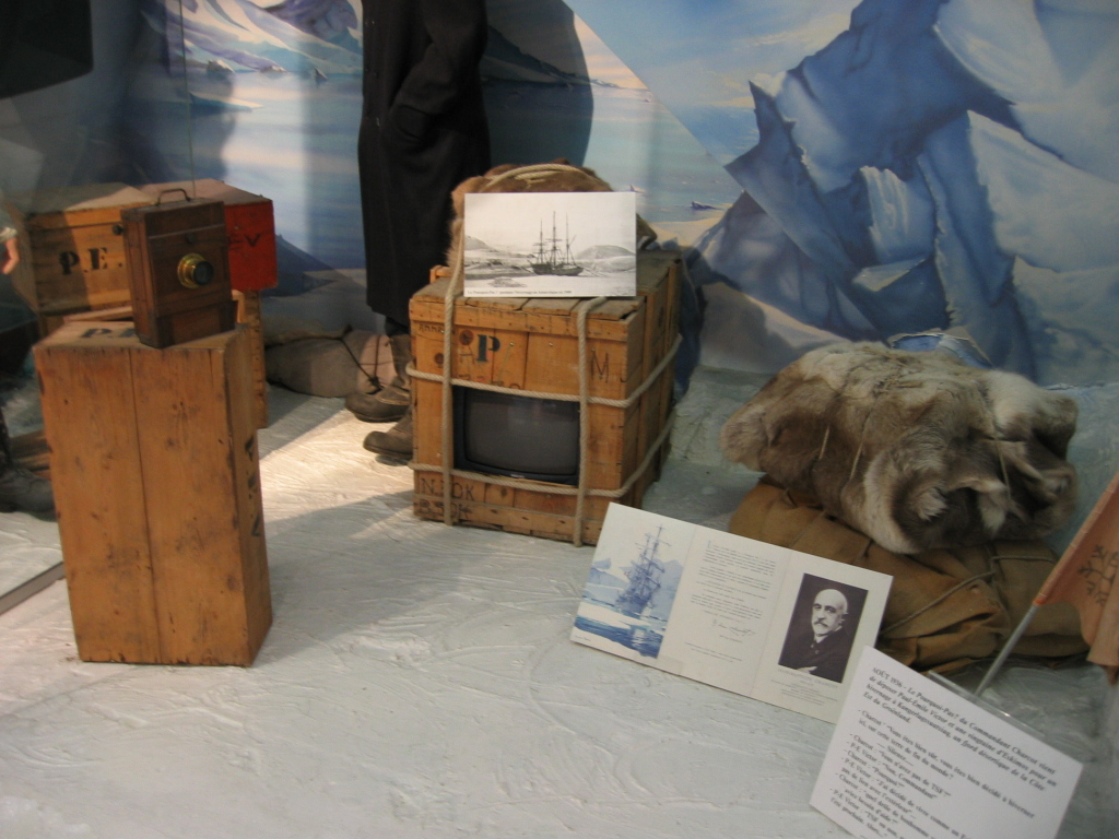 Musée Paul Emile Victor - Prémanon dans le Haut Jura - France